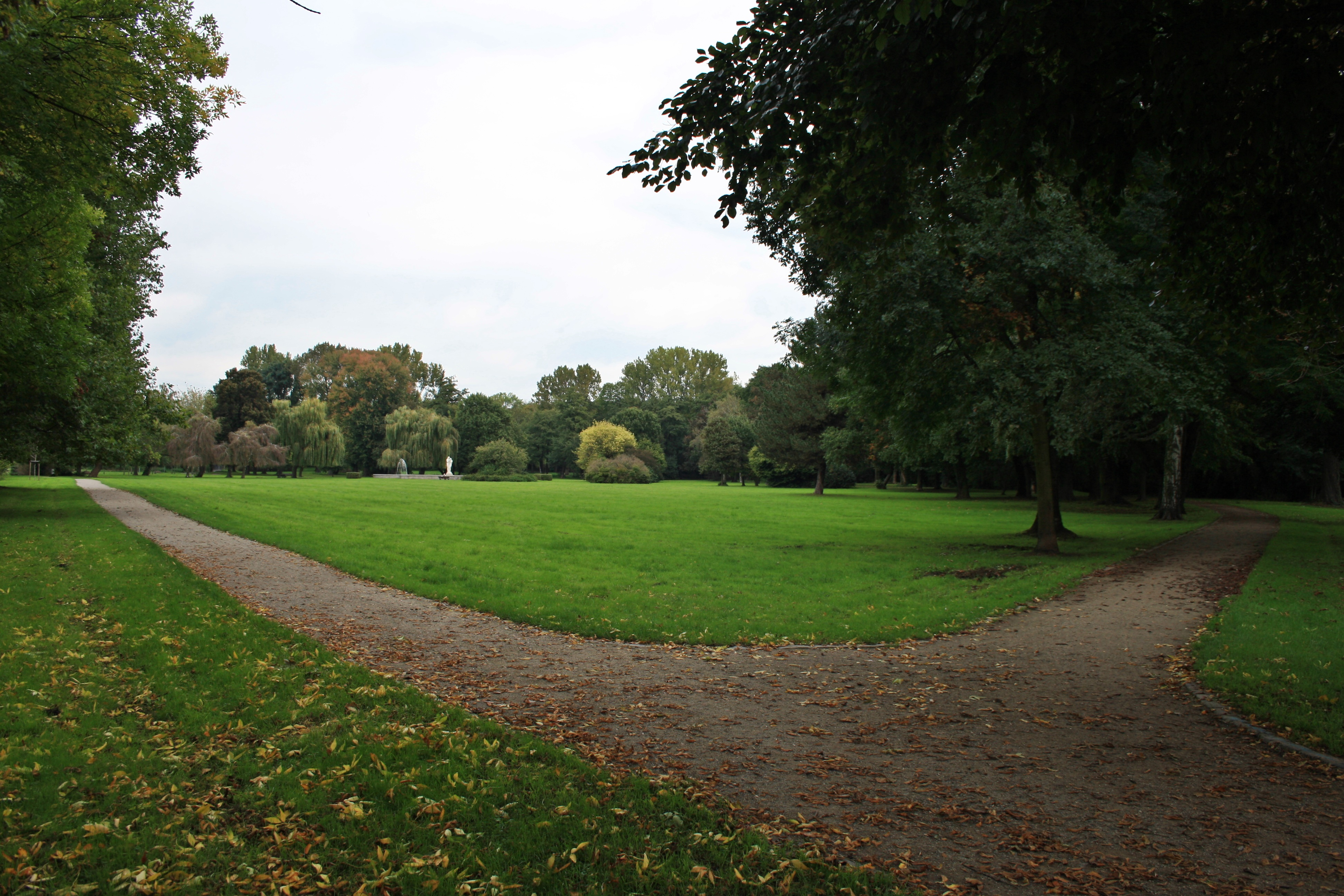 Stadtpark Delitzsch - Südosteingang